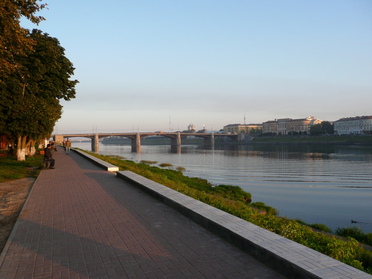 Afanasy Nikitin Embankment in Tver